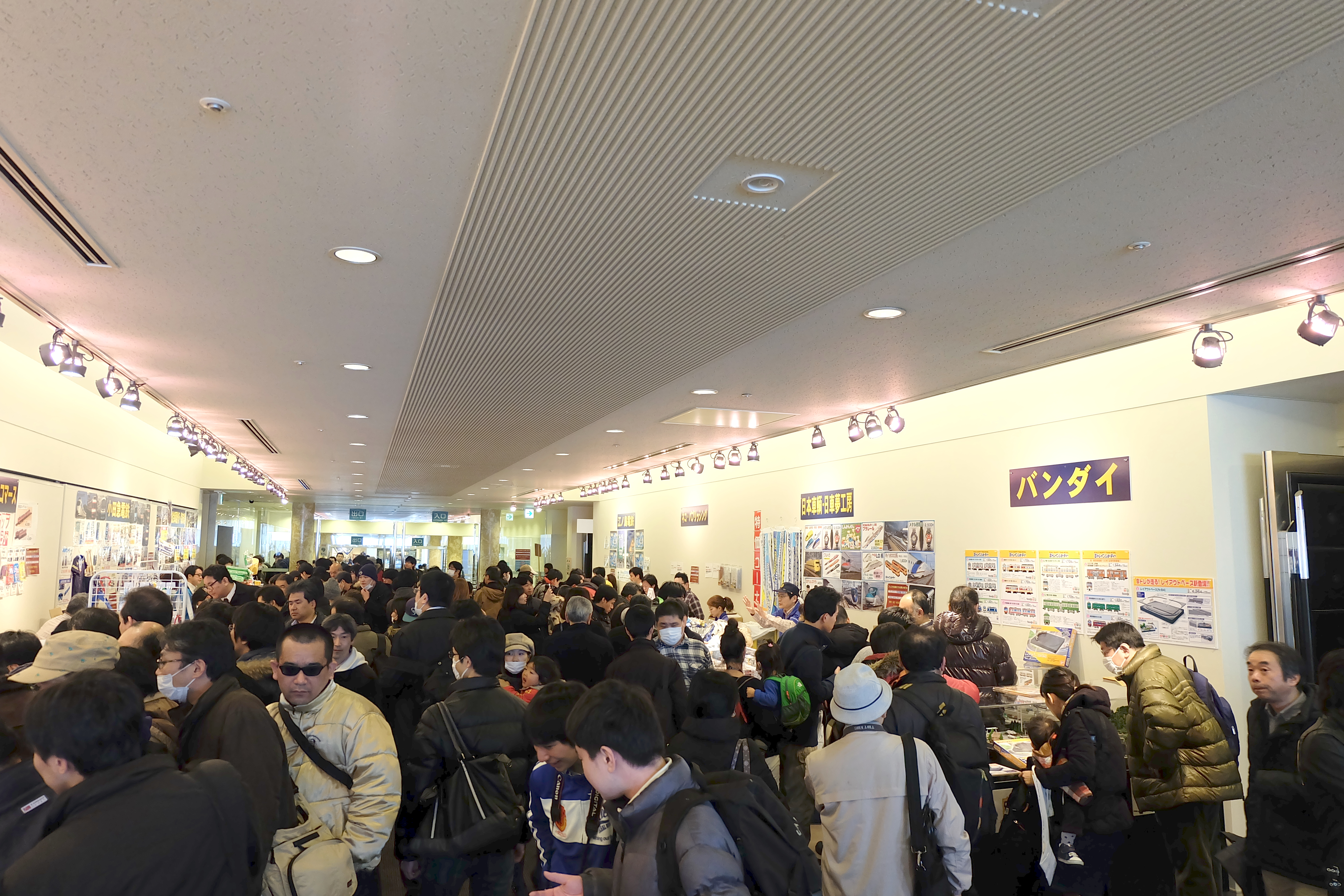 ヨコハマ鉄道模型フェスタ2013 販売エリア